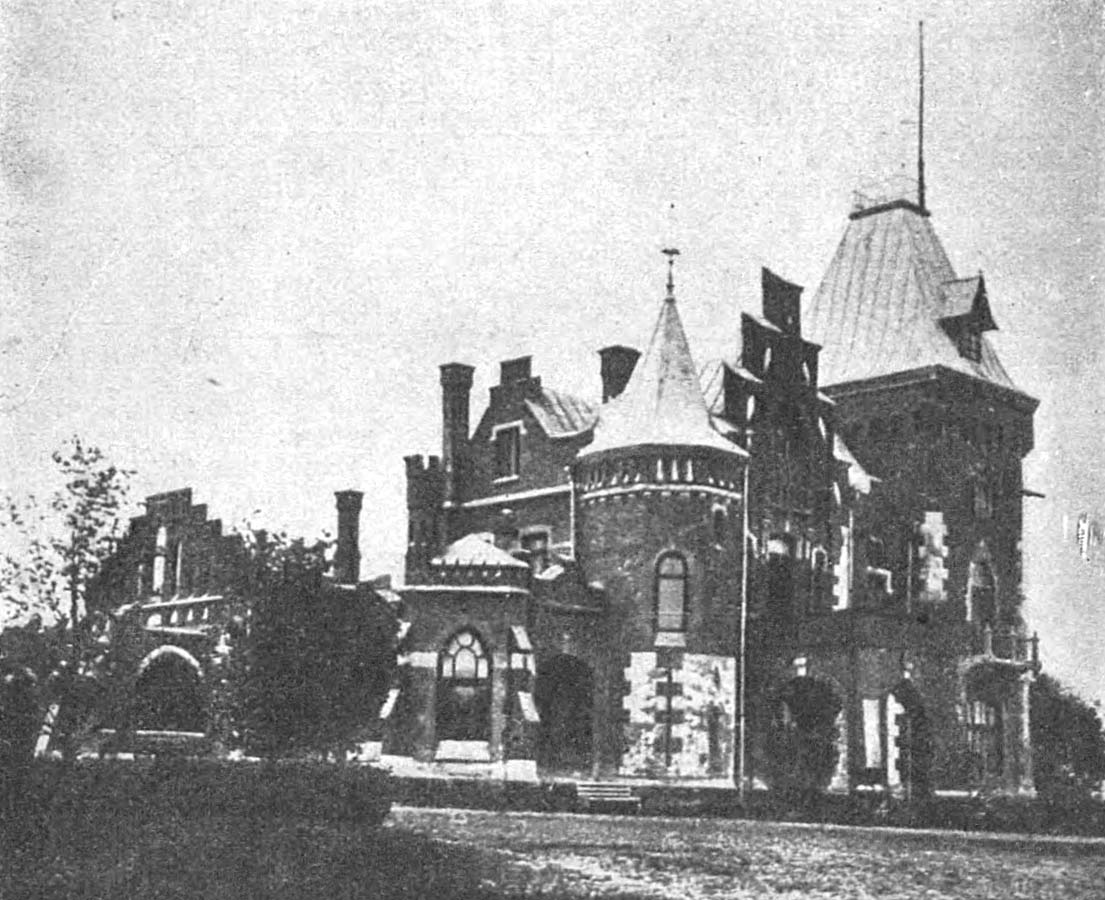 Беларуская (тарашкевіца): Расоны (Rasony), Станіславова (Stanisłavova), сядзіба Гласкаў (Hłaska)